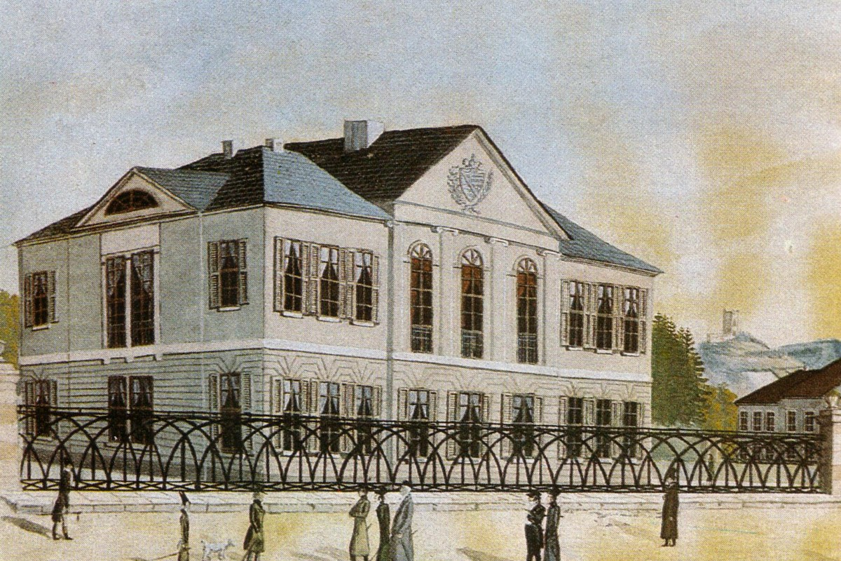 Großes Palais in Meiningen vor seinem Umbau um 1840